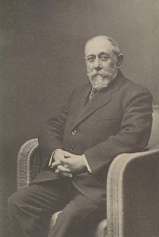 Enrique Peinador Vela, Pontevedra, 1847- Troncoso, Mondariz, 1917